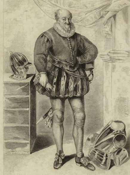 Martin Ruzé de Beaulieu, (1530-1613), Secrétaire d'État sous Henri III, Henri IV et Louis XIII.